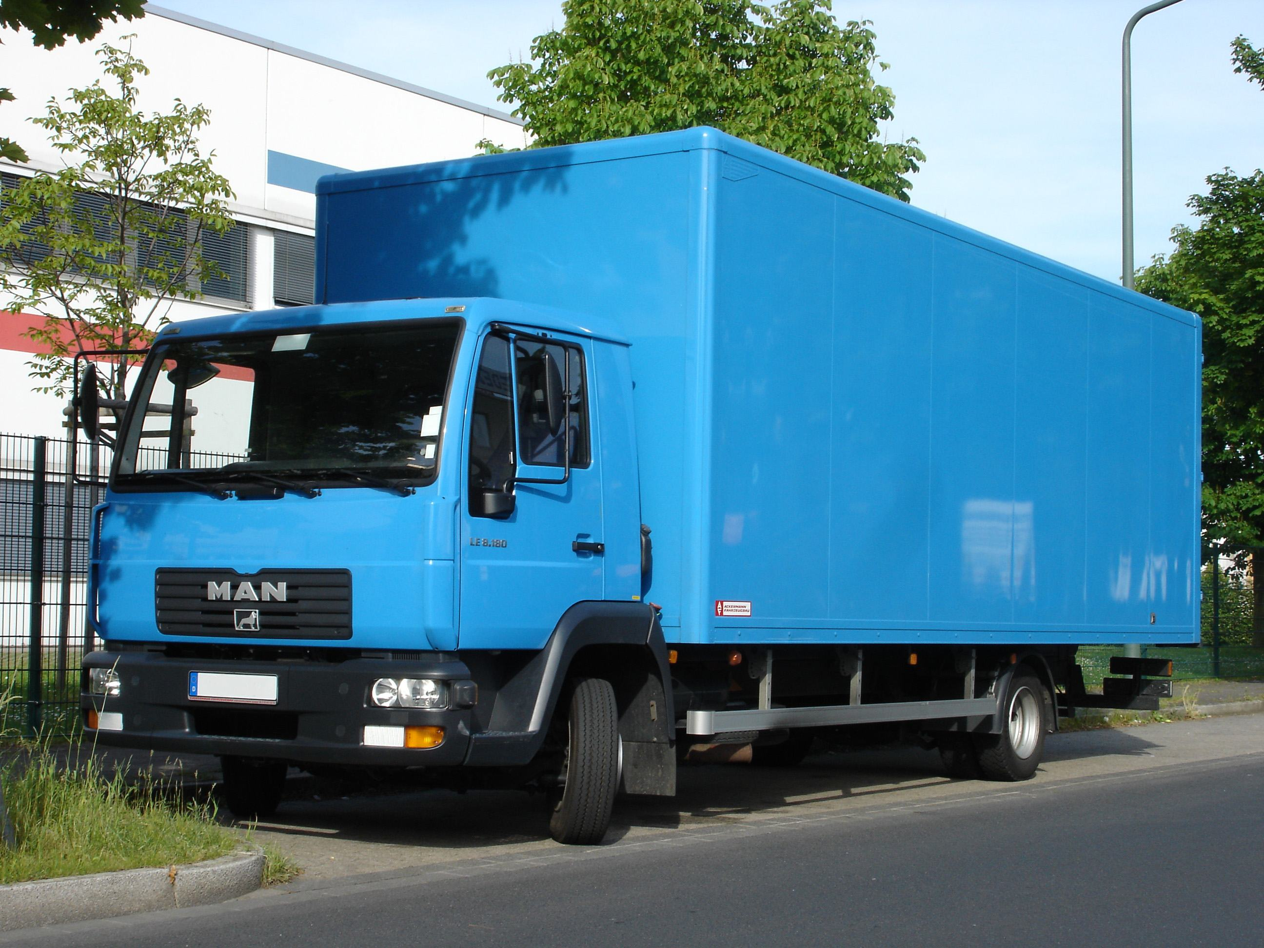 MAN LE 8-180 C Koffer-Lkw